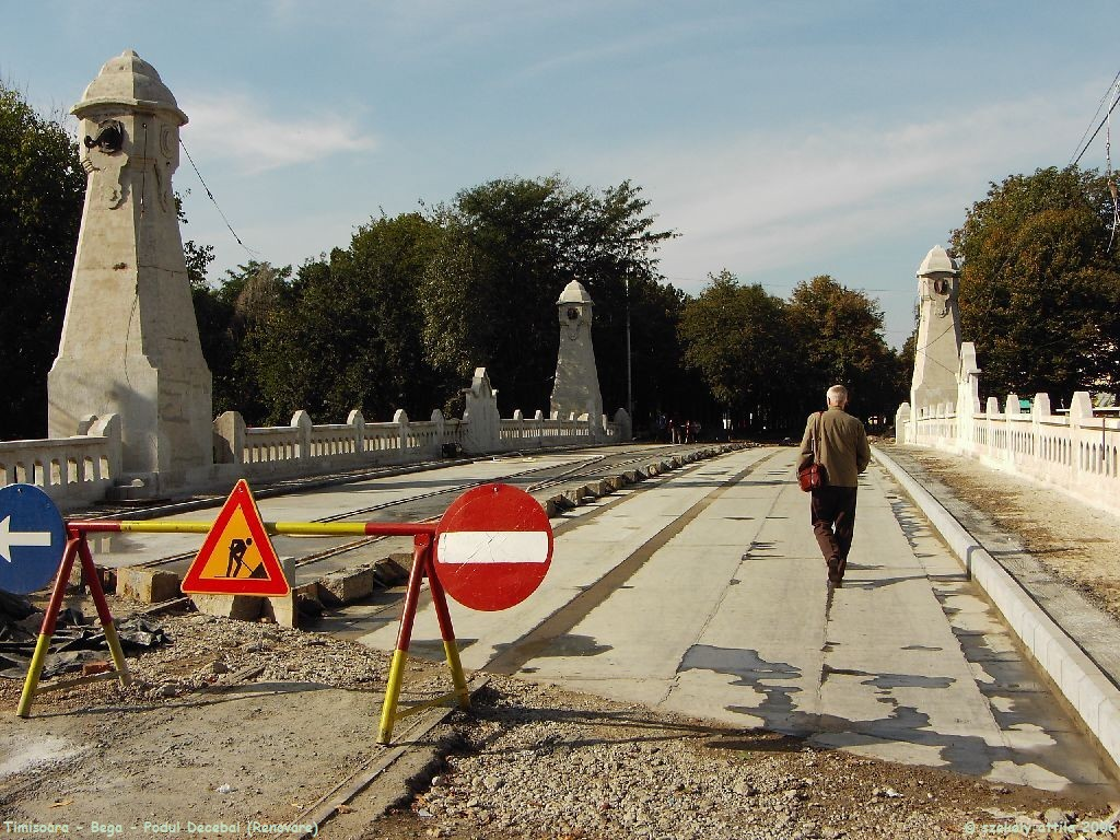 Podul Decebal in renovare *** D. Brücke in sanierung *** D. híd felújítása